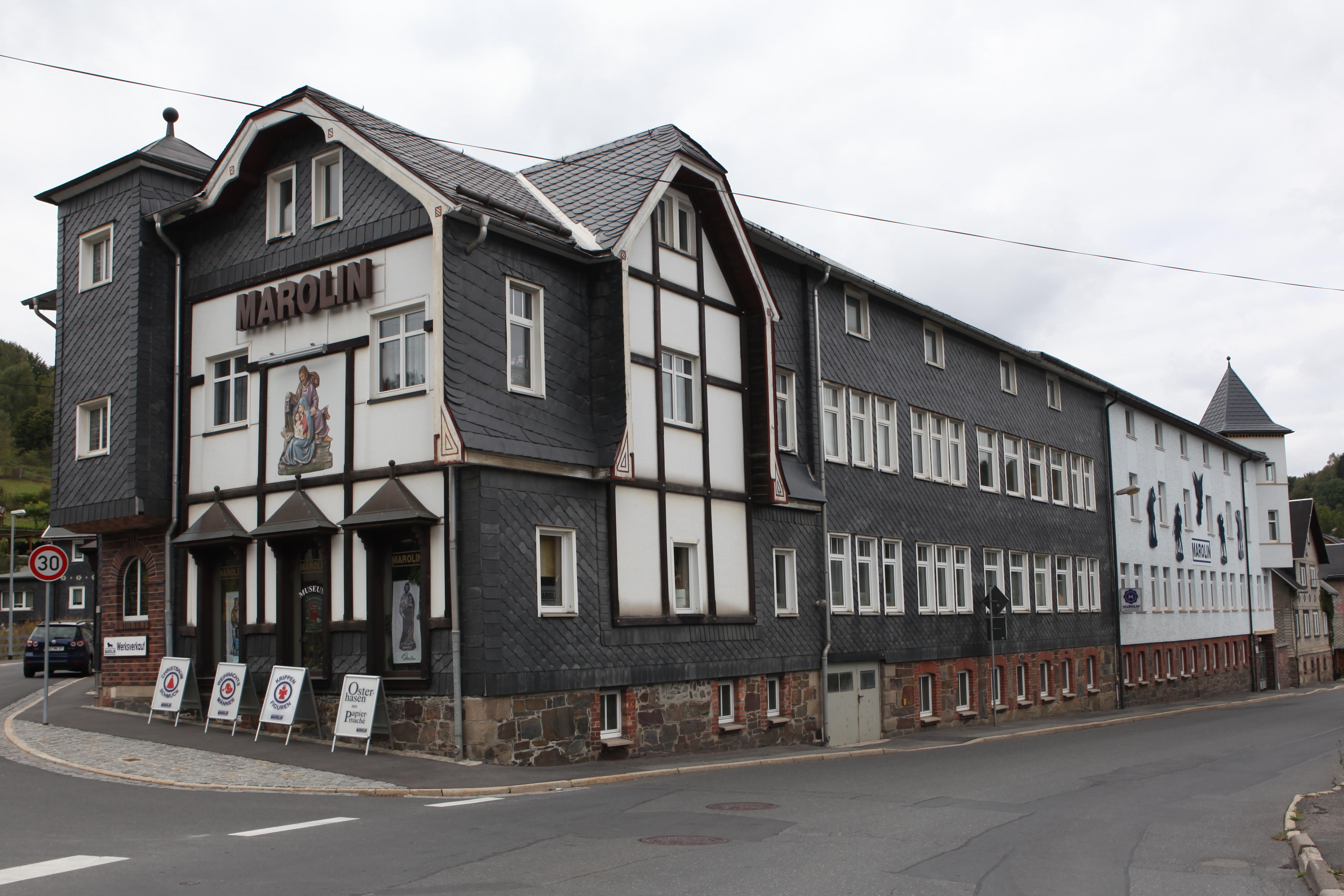 Marolin, Ansicht Sonneberger Straße, Steinach in Thüringen